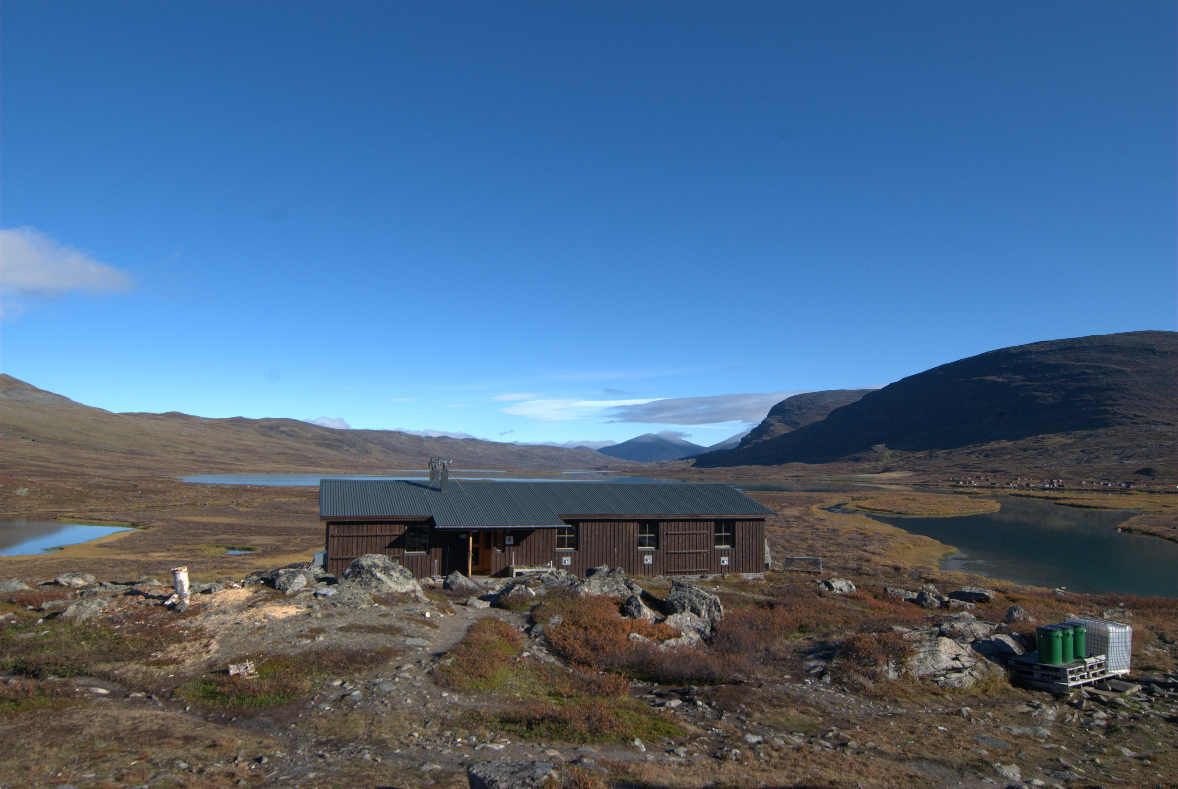 Alesjaurestugan